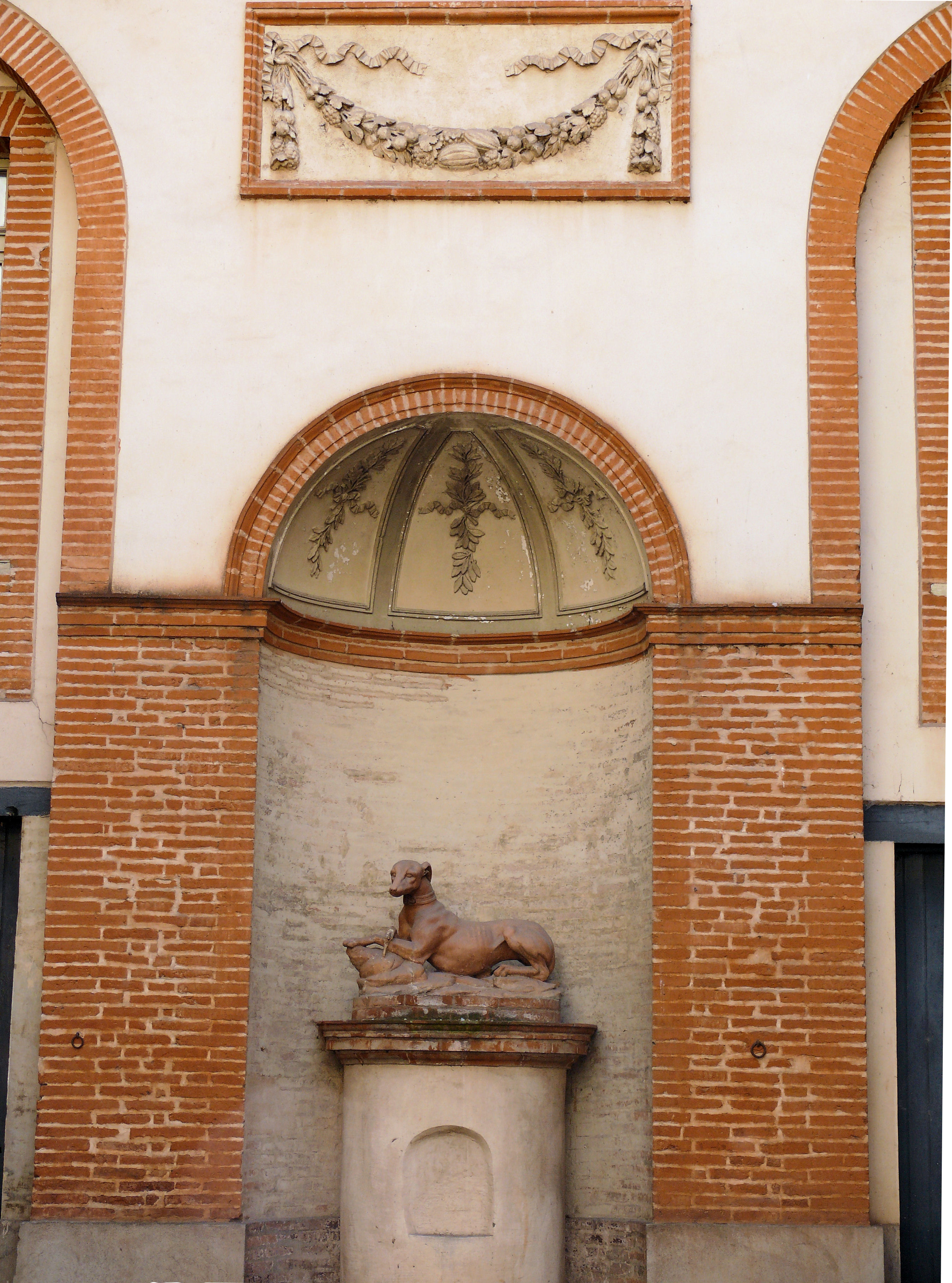 Montauban - Hôtel de Monmilan, 11 rue de l'Hôtel-de-Ville